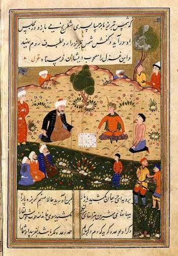 Playing chess